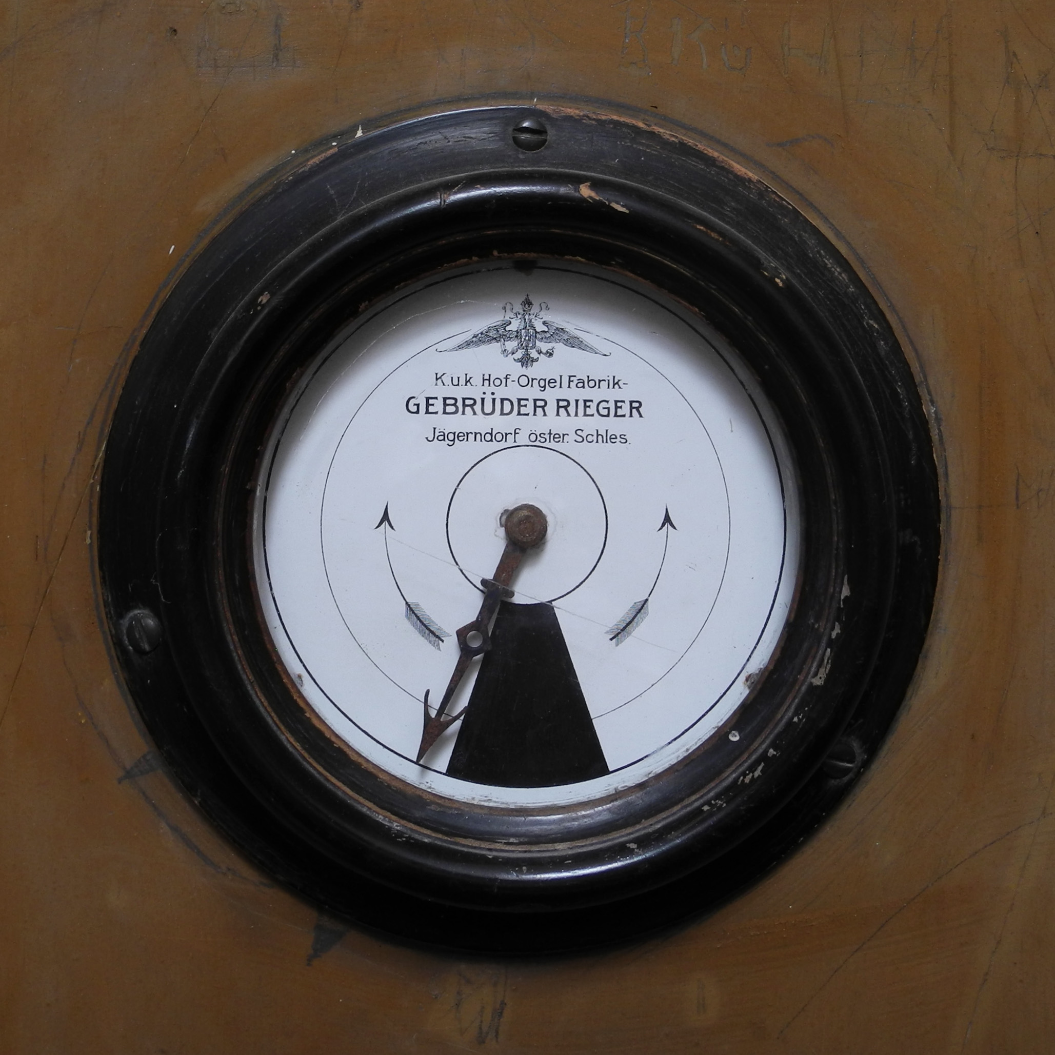 Windanzeiger mit Firmenschild an der Seitenwand der Rieger-Orgel in der Martinskirche in Liebeschitz (Liběšice), errichtet zwischen 1904 und 1914